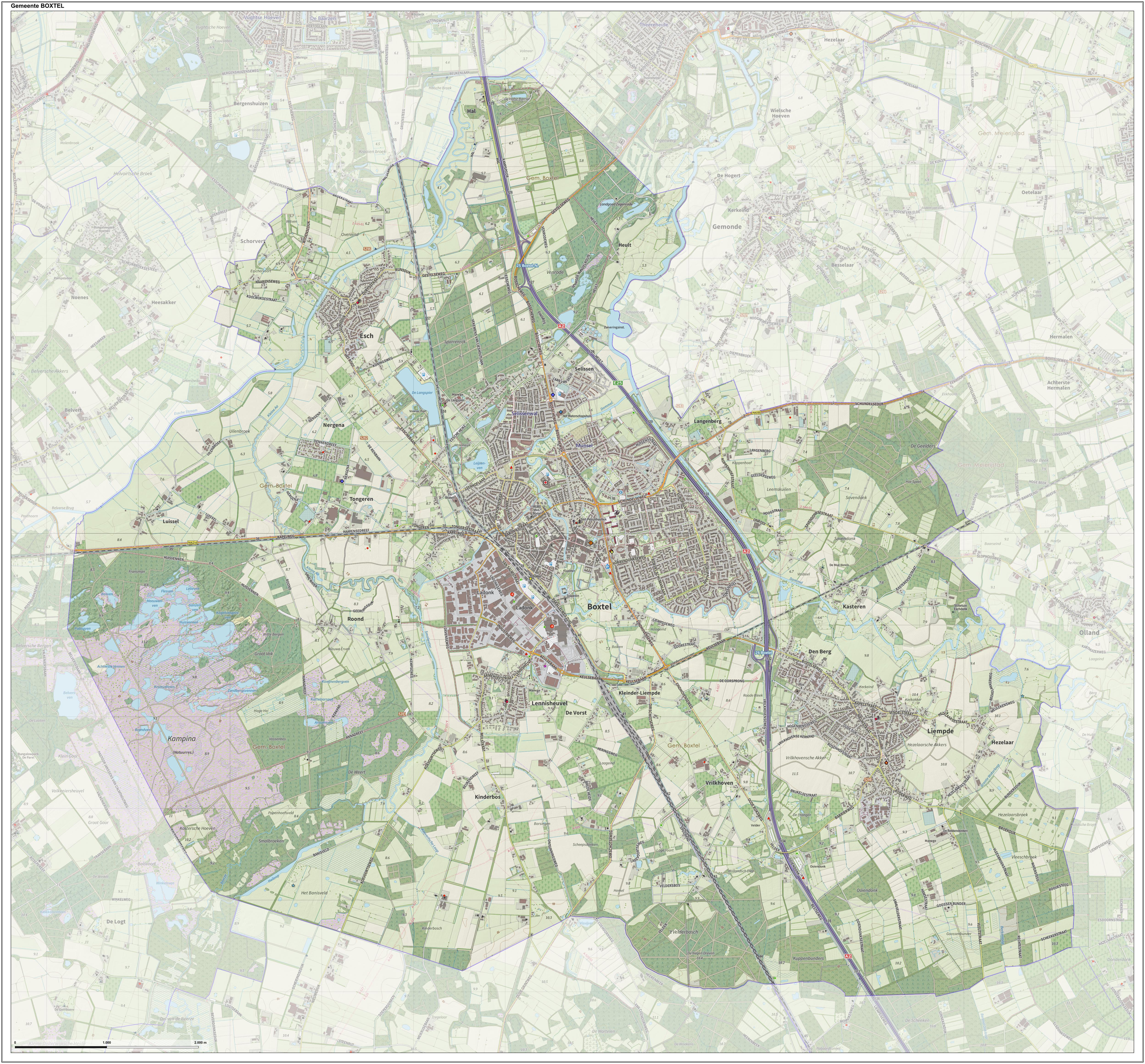 Topografische gemeentekaart. Resolutie: 400 pixels/km. Kaartbeeld samengesteld uit de open geodata van de Top10NL en Top25namen (Kadaster), Creative Commons-BY licentie. Gebouwvlakken uit open geodata BAG extract. Wegen uit de OpenStreetMap, OpenStreetMap community. Reliëfschaduw uit de Actuele Hoogtekaart AHN2. Samenstelling en kleurenschema: Jan-Willem van Aalst, met QGIS. Zie ook de Legenda.